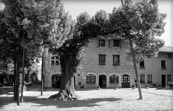 Place de la Halle dite place du Tilleul, à Pérouges.